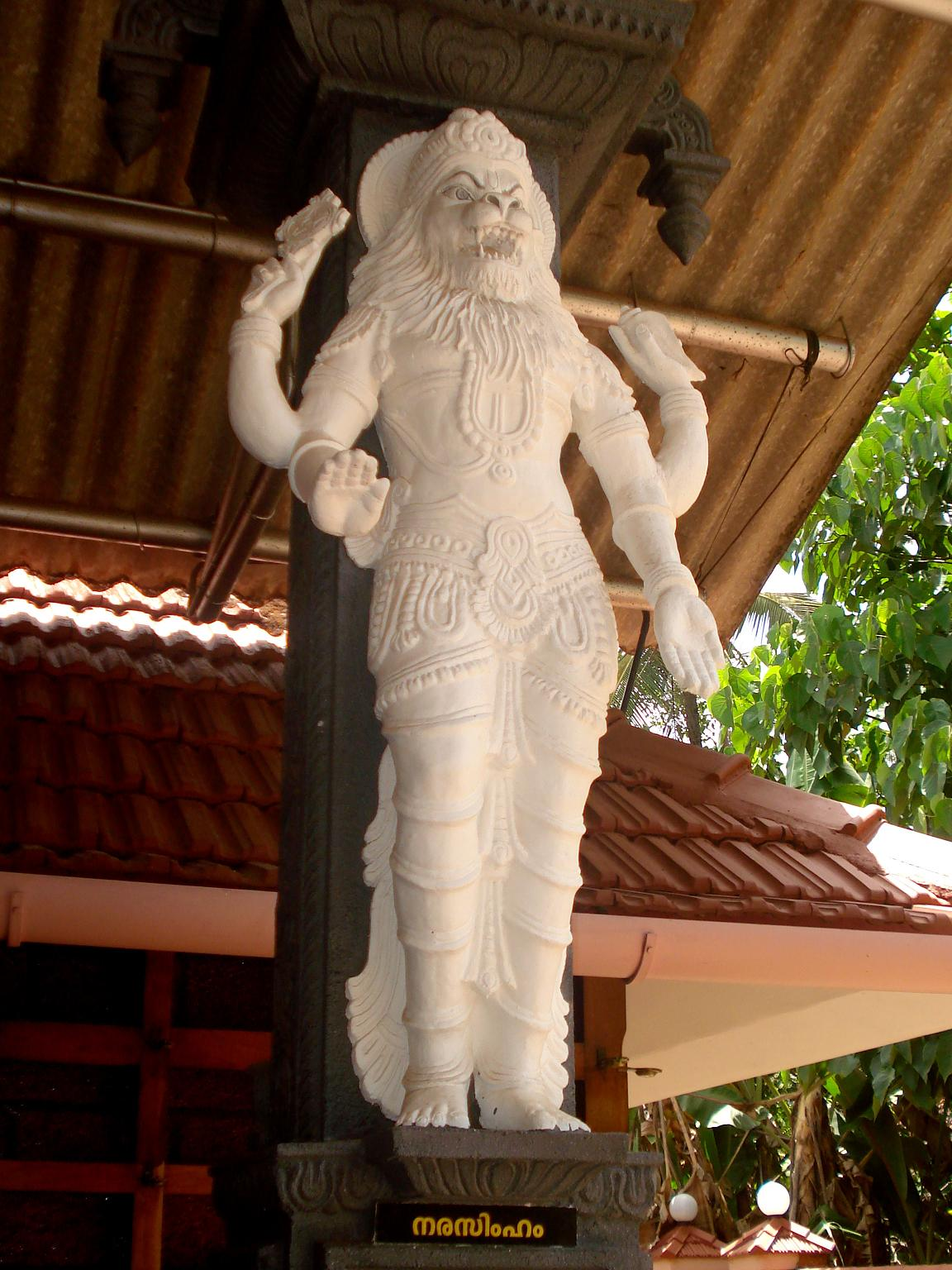 മഹാവിഷ്ണുവിന്റെ പത്ത് അവതാരങ്ങളിൽ നാലാമത്തെതാണ് നരസിംഹം. ചിത്രം എടുത്തത് കേരളത്തിൽ കണ്ണൂർ ജില്ലയിലെ കൂടാളി താറ്റിയോട്ട് അമ്പലത്തിൽ നിന്നാണ്.